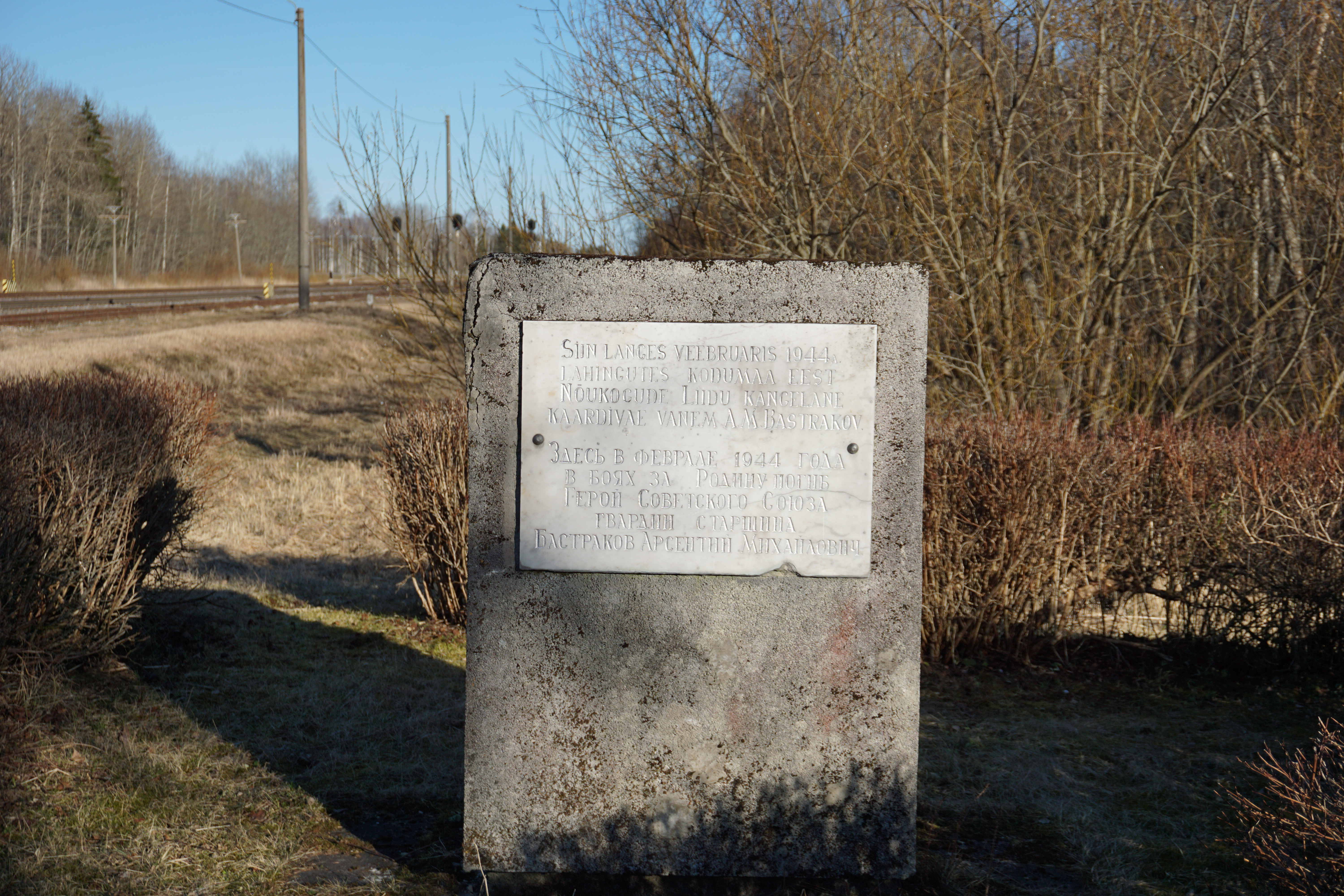 Arsenti Bastrakovi mälestusmärk Auvere jaamas